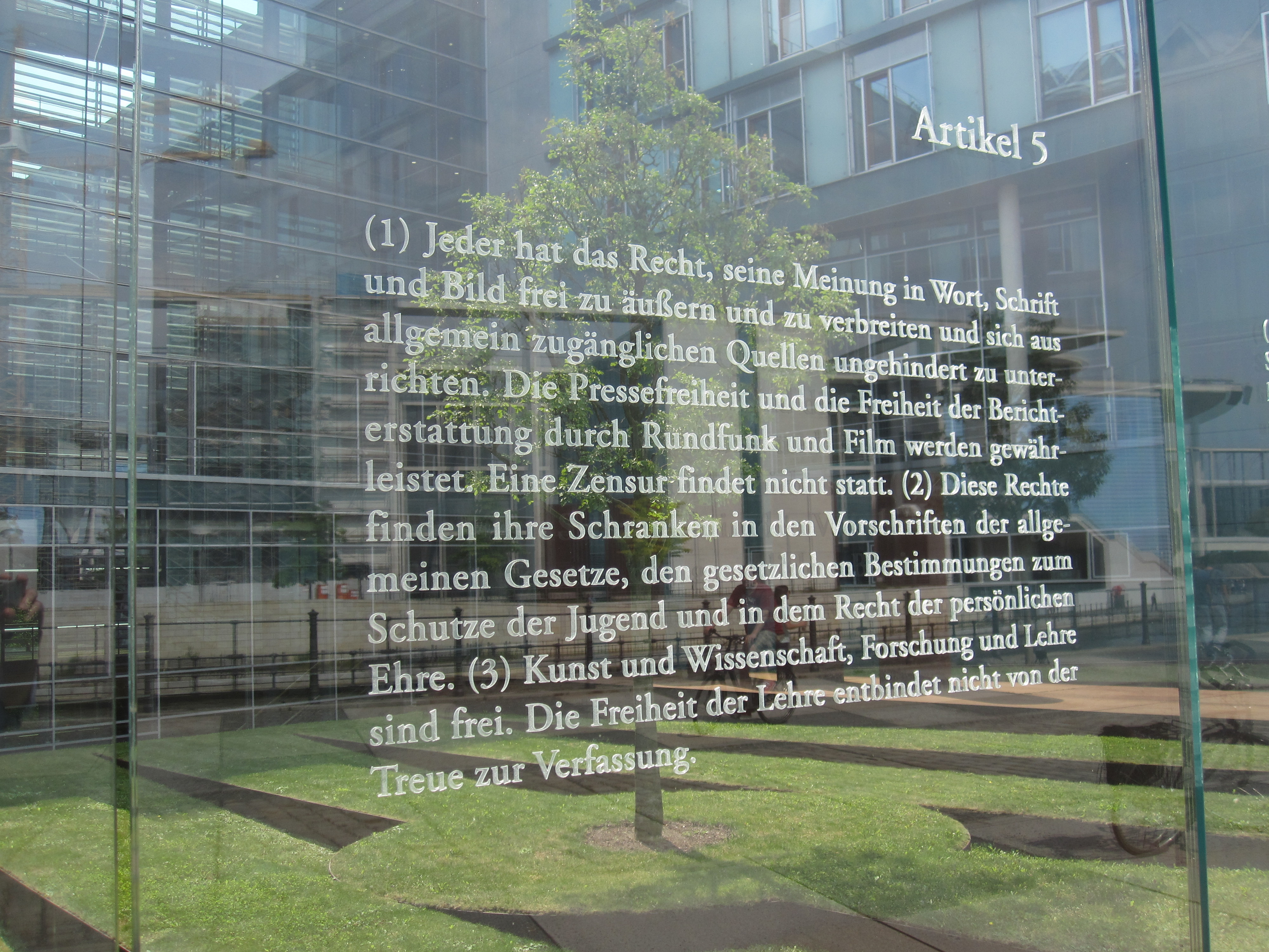 Bundestagsgebäude in Berlin: Der israelische Künstler Dani Karavan hat in drei Meter hohe Glasscheiben, die einen Außenhof des Jakob-Kaiser-Hauses im Uferbereich zur Spree begrenzen, die 19 Grundrechtsartikel des Grundgesetzes mit Laser eingraviert. „Die Grundrechtsartikel schweben gleichsam in Augenhöhe vor dem Haus der Fraktionen, dem Jakob-Kaiser-Haus“ (Andreas Kaernbach, Deutscher Bundestag).